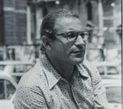 Filiberto Menna (1926-1988)